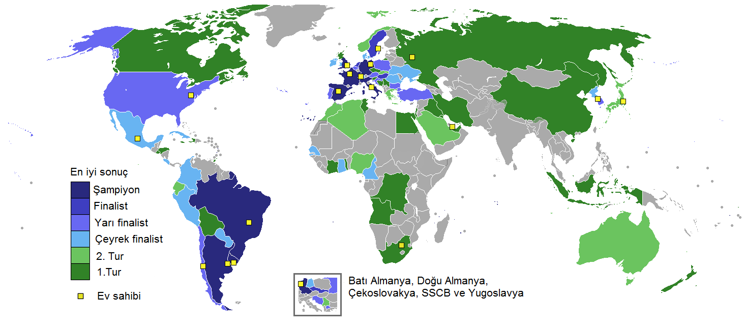 World cup countries best results and hosts.png adlı dosyanın Türkçeleştirilmiş halidir.